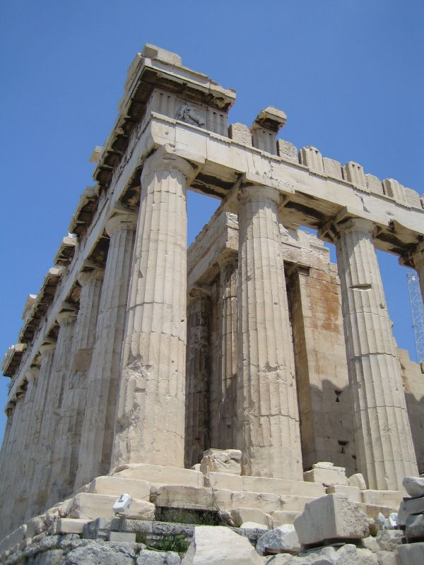 Esquina suroeste del Partenón. El Partenón (del griego Παρθενος Parthenos -Virgen-; uno de los adjetivos que servían de sobrenombre a Atenea) es el templo griego de orden dórico, situado en la Acrópolis de Atenas dedicado a Atenea Parthenos. De mármol blanco del monte Pentélico, fue iniciado por Pericles y se desarrolló entre los años 447 y 432 adC. Los arquitectos encargados de la obra fueron Ictino y Calícrates y estuvieron bajo las órdenes del famoso escultor ateniense Fidias.